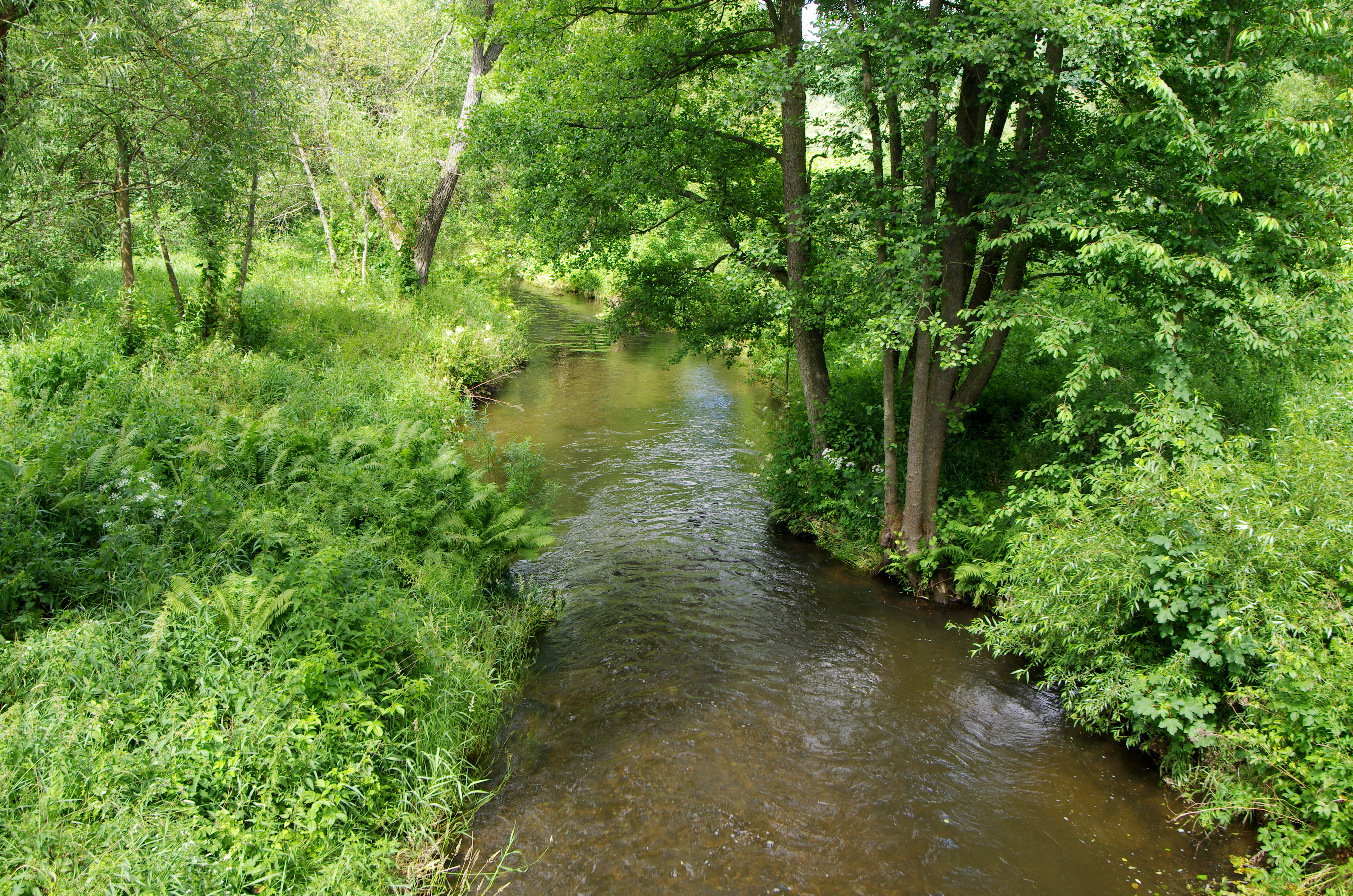 Řeka Střela u Žlutic, okres Karlovy Vary